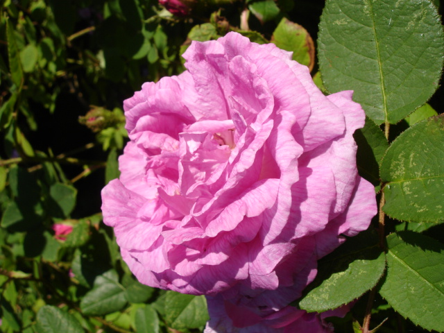 Rosa Centifolia Muscosa-group 'Julie De Mersent'